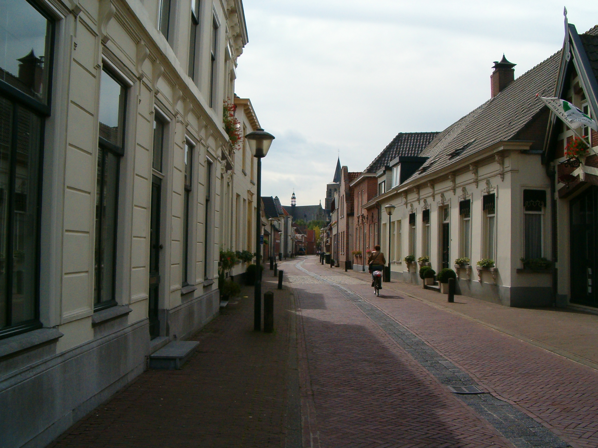 Roosendaalsestraat in Wouw